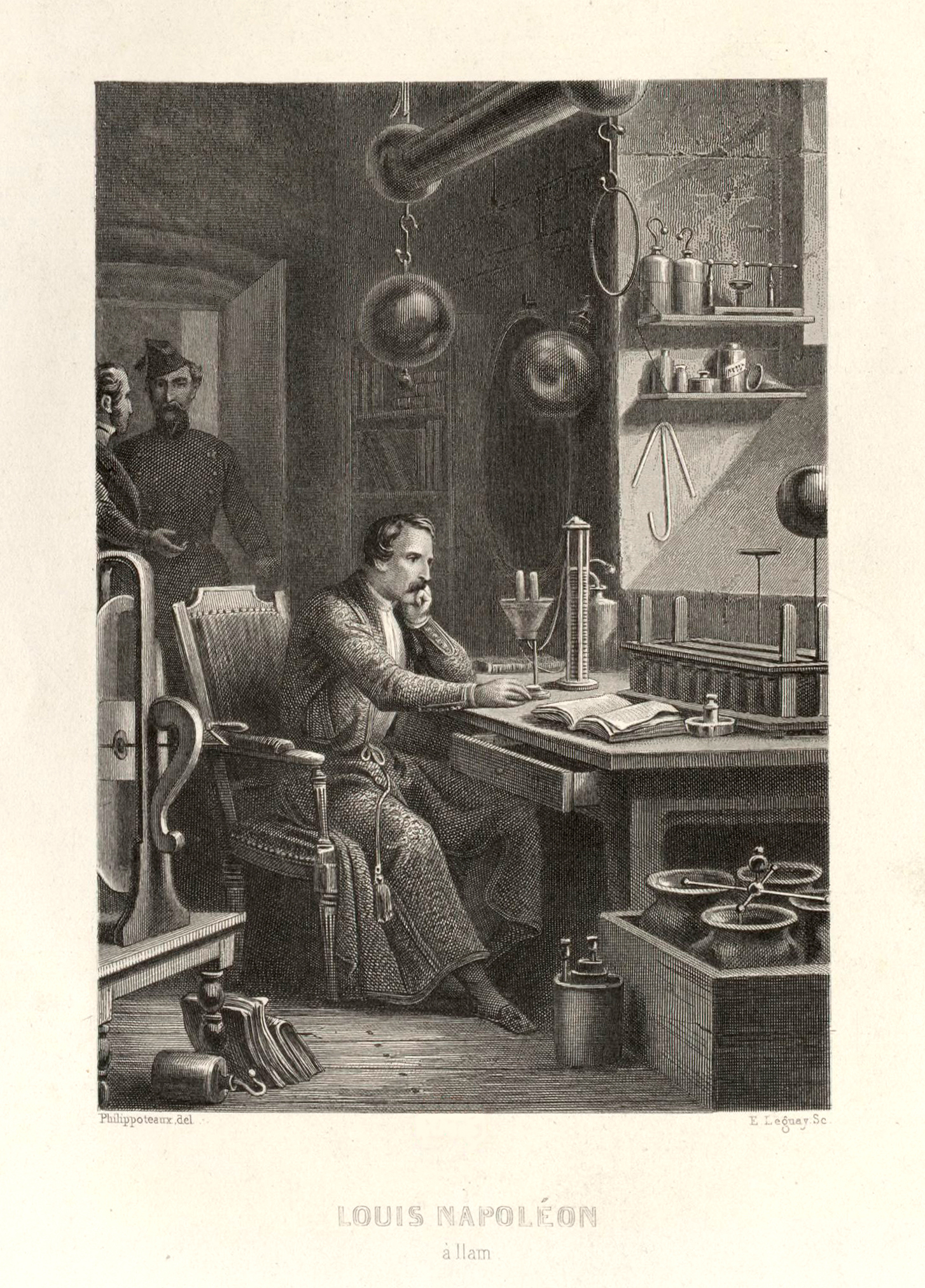 Louis-Napoléon, incarcéré au fort de Ham, fait une expérience de physique. Estampe dessinée par Philippoteaux et gravée par E. Leguay, extraite de l'ouvrage de Paul Lacroix, Histoire politique, anecdotique et populaire de Napoléon III, empereur des Français, et de la dynastie napoléonienne, vol. 2, Paris, Dufour, Mulat et Boulanger, 1853.